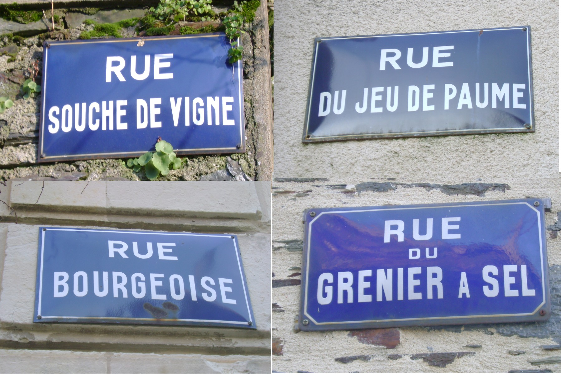 Noms de rues candéennes, 49, France